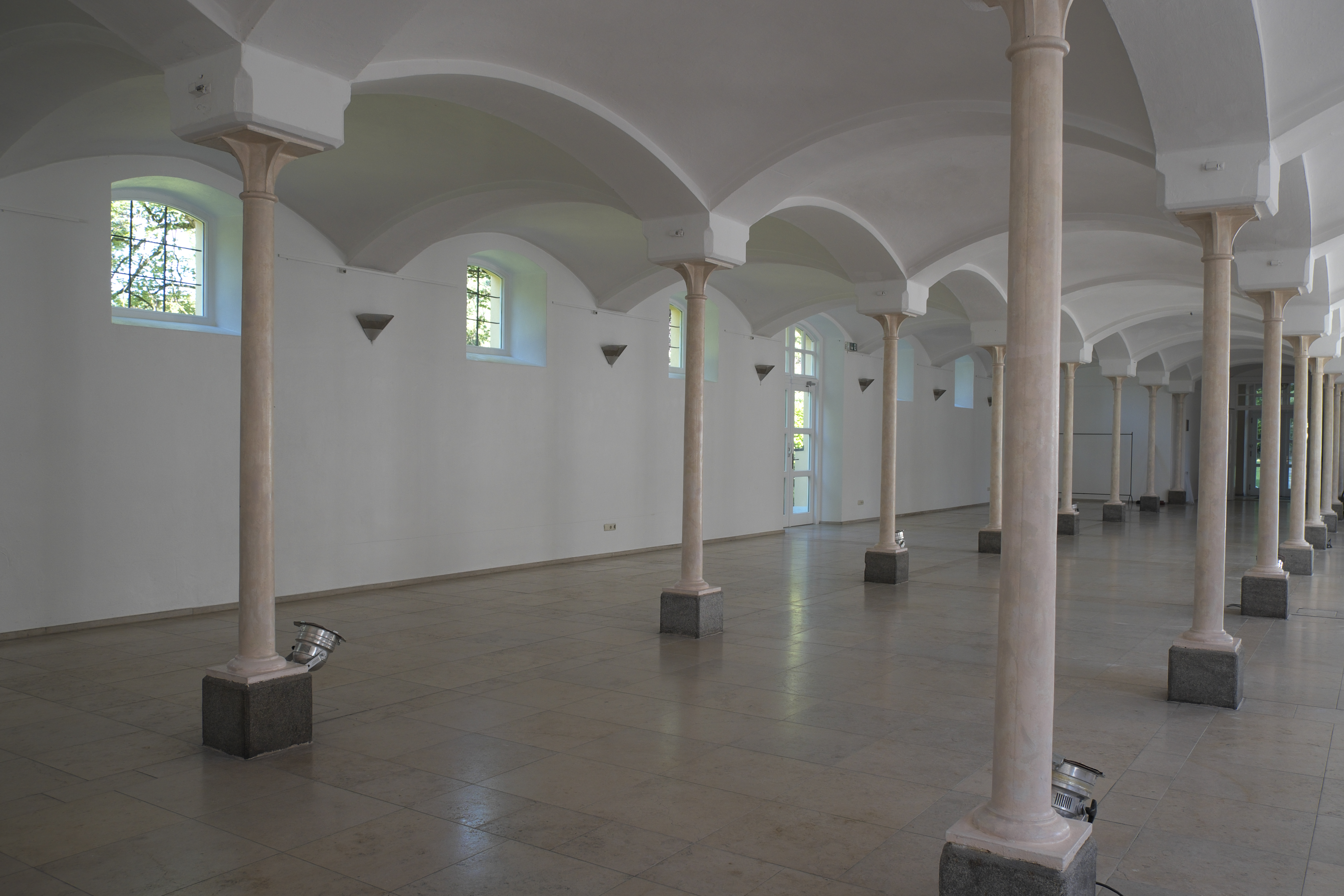 Ehemaliger Marstall des Schlosses Berg in Berg im Landkreis Starnberg (Bayern/Deutschland)